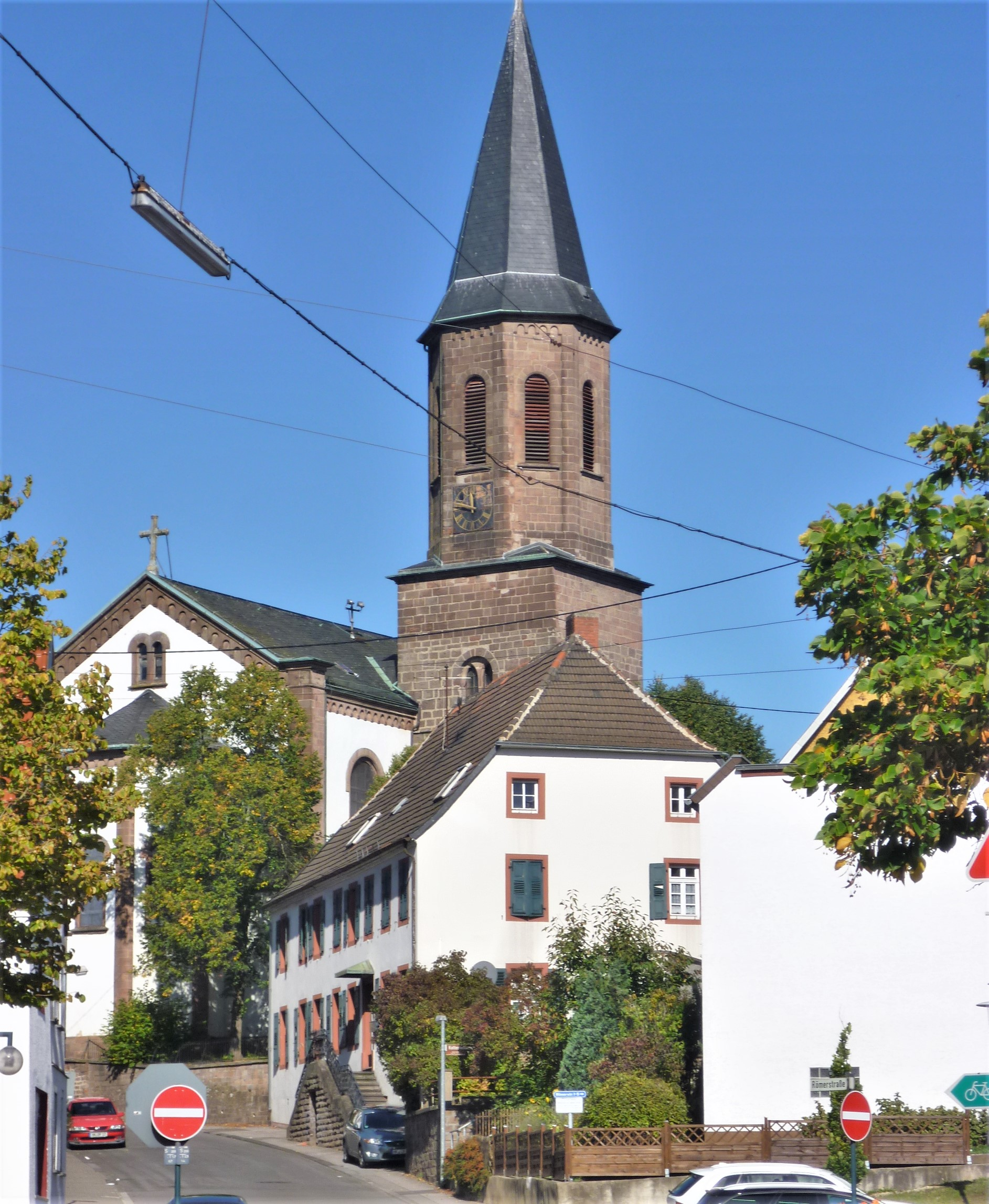 Evangelische. Pfarrkirche Wiebelskirchen